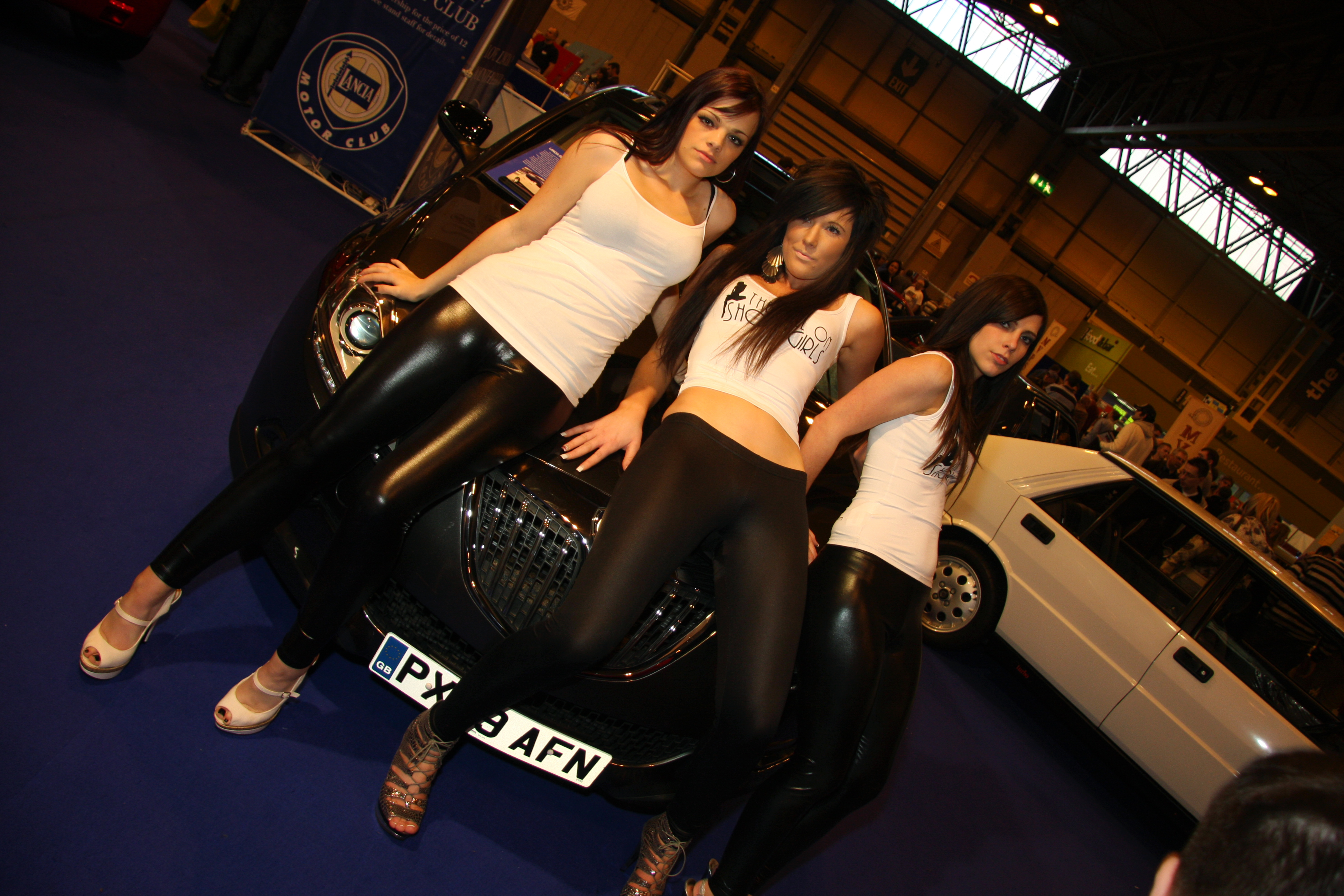 £ ragazze sul cofano di una Lancia Delta (2008)